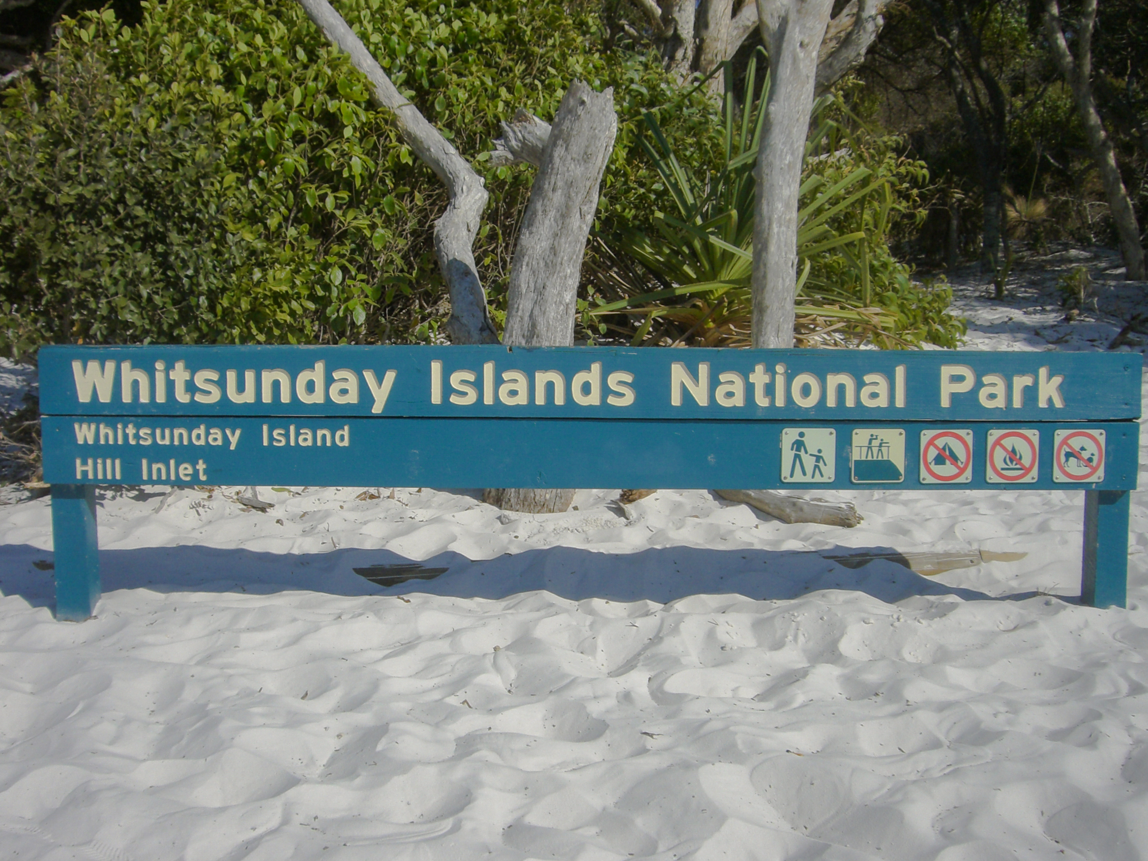 Die Whitsunday Islands sind eine Inselgruppe vor der Ostküste des australischen Bundesstaates Queensland.